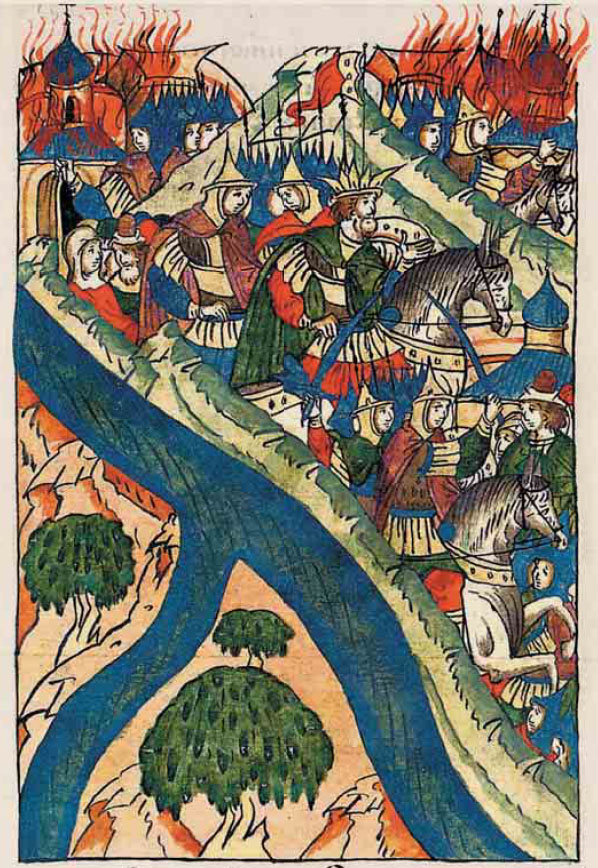 Лицевой летописный свод. 1521 год. Нашествие крымского хана Мехмед Гирея.